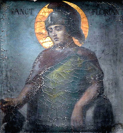 Старинное настенное изображение св. Флориана на южной стороне бывшей ризницы в Пёртшах ам Вёртерзее, что в Каринтии, Верхняя Австрия